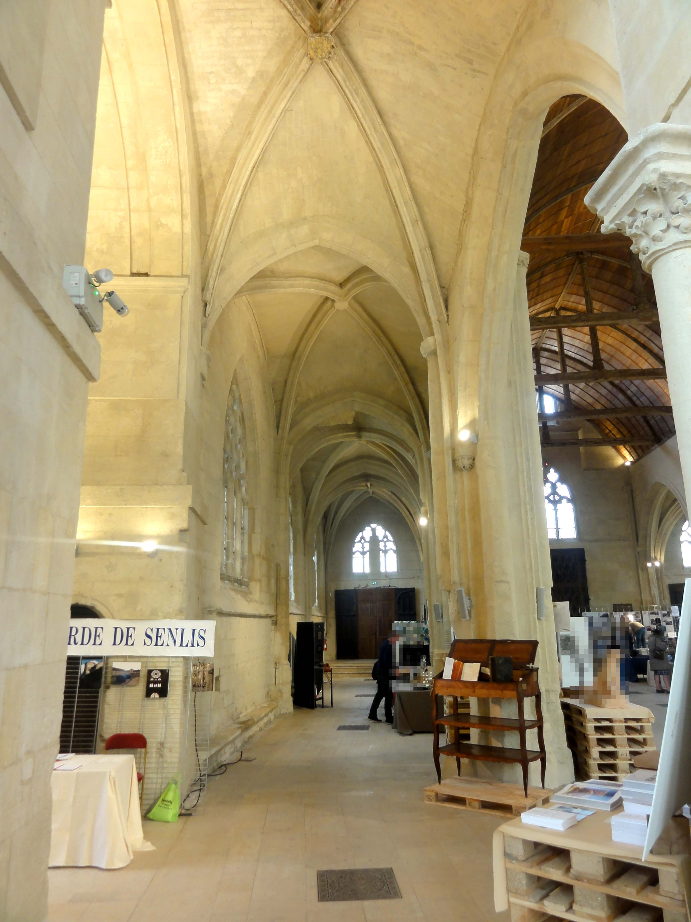 Intérieur de l'église - voir titre.